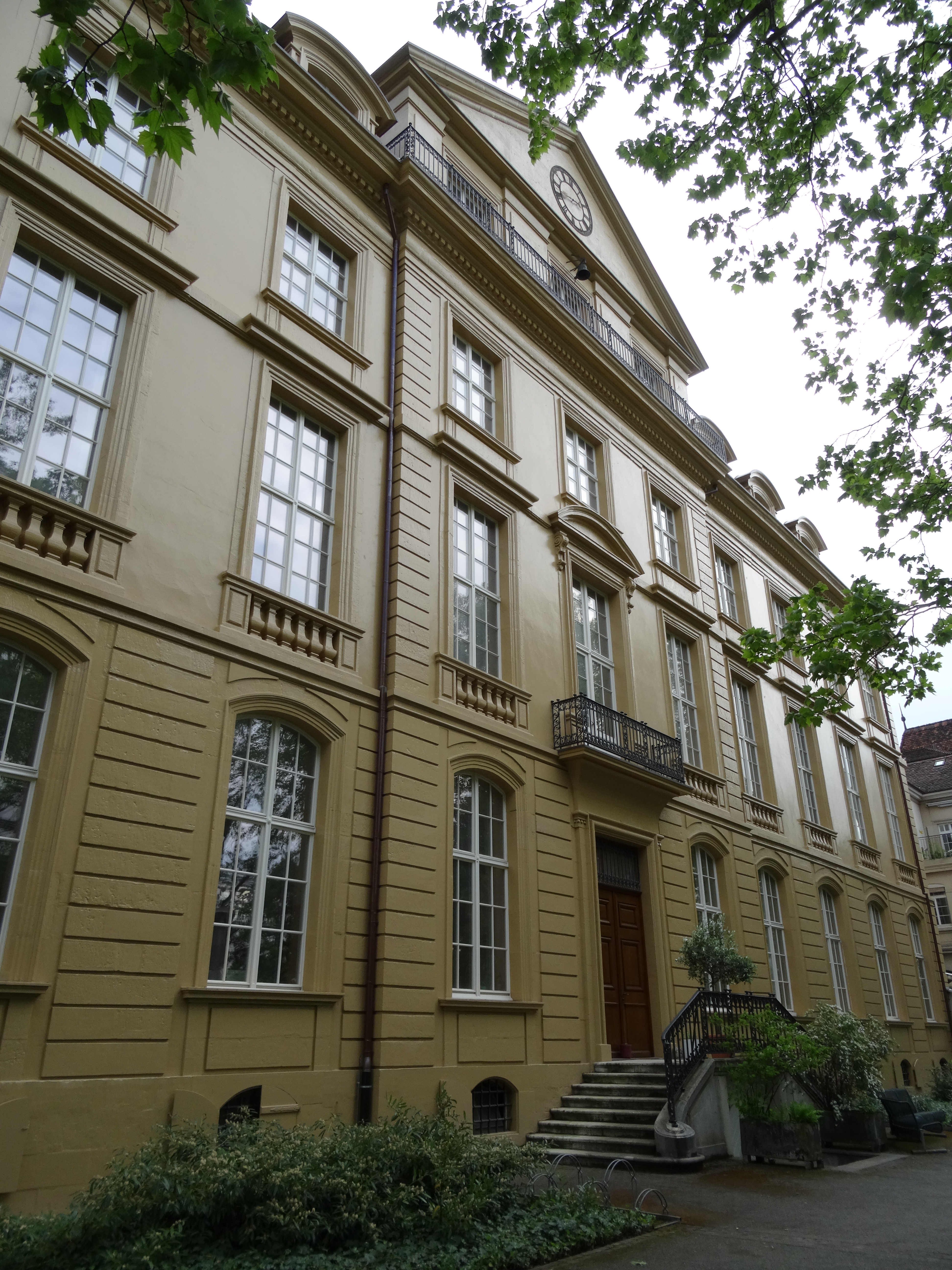 Fassade des Markgräflerhofs an der Hebelstrasse 10 in Basel. Sie beherbert das Blutspendezentrum beider Basel.